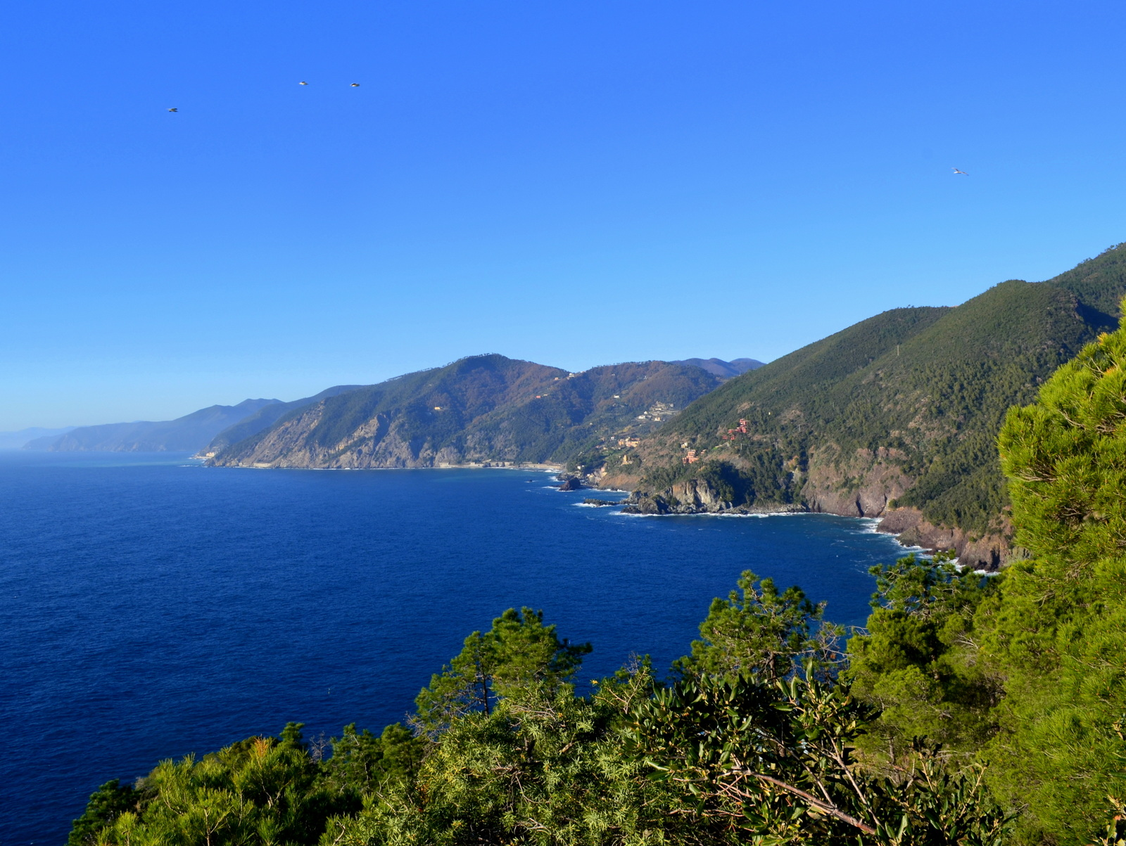 Punta Salto della Lepre, Bonassola